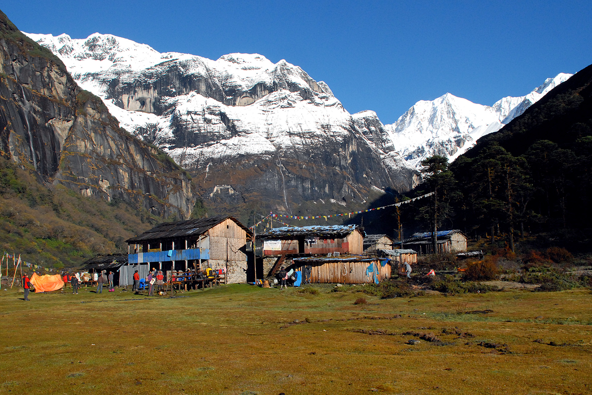 Morning in Yangle Kharka, 3660m, BARUN trekking 2013.